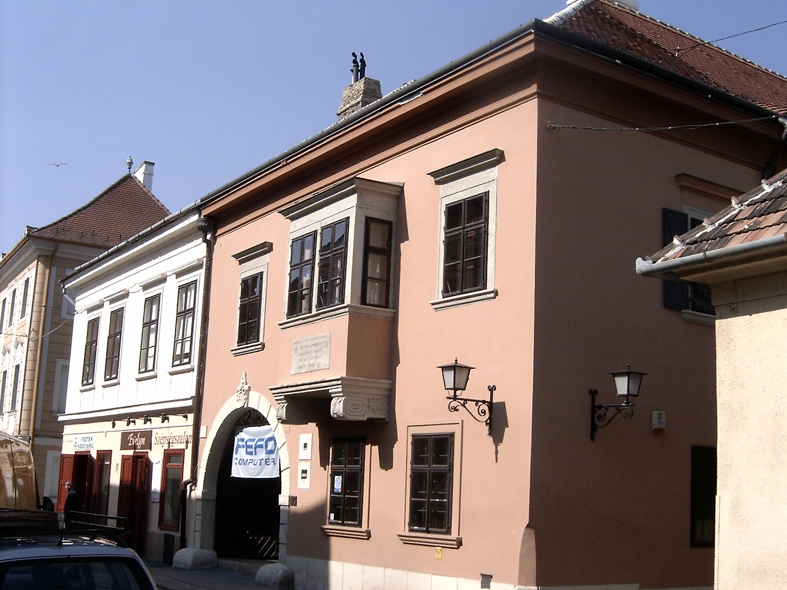 A reneszánsz Fejérváry-ház Győrött